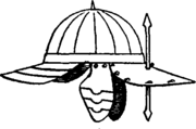 Венгерскі шлем або шышак 16—17 ст.